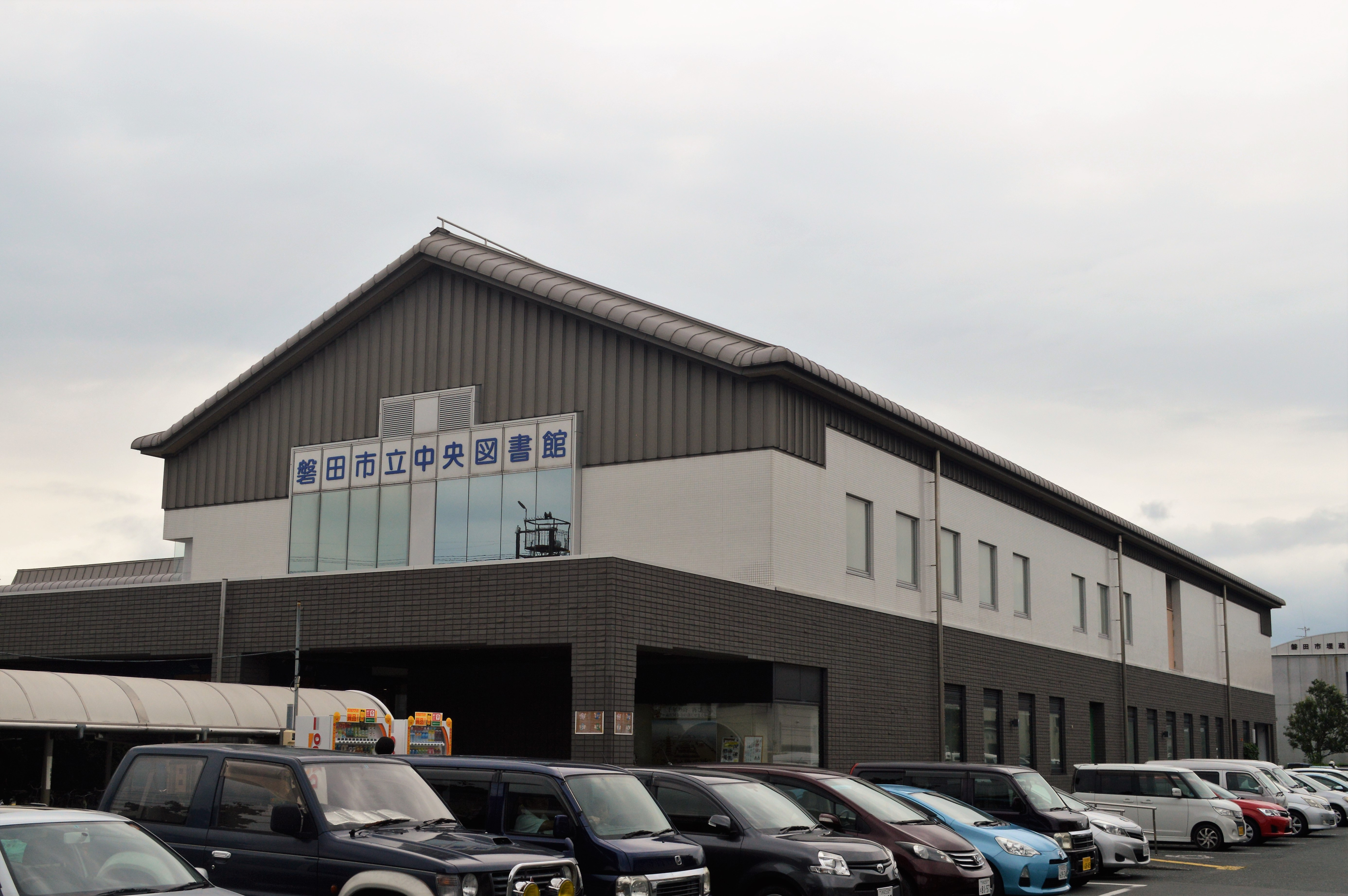 静岡県磐田市の磐田市立中央図書館。